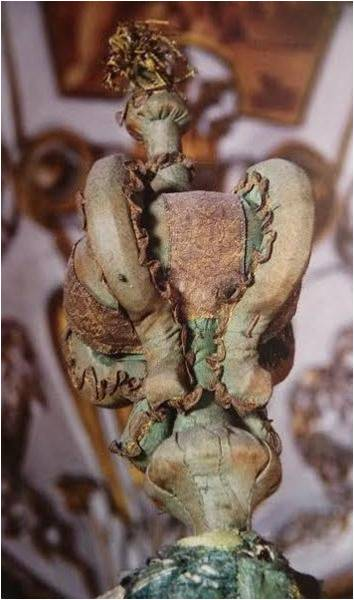 Llit